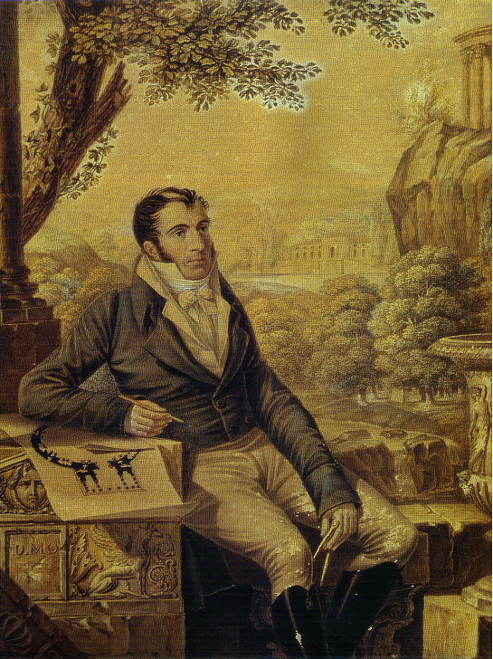 Portrait de l'architecte français François-Léonard Seheult (1768-1840), dessin rehaussé en couleur, anonyme et non daté.